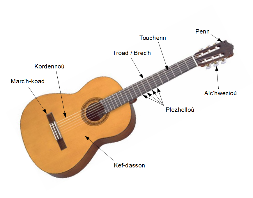 Détails des différents éléments d'une guitare classique en breton